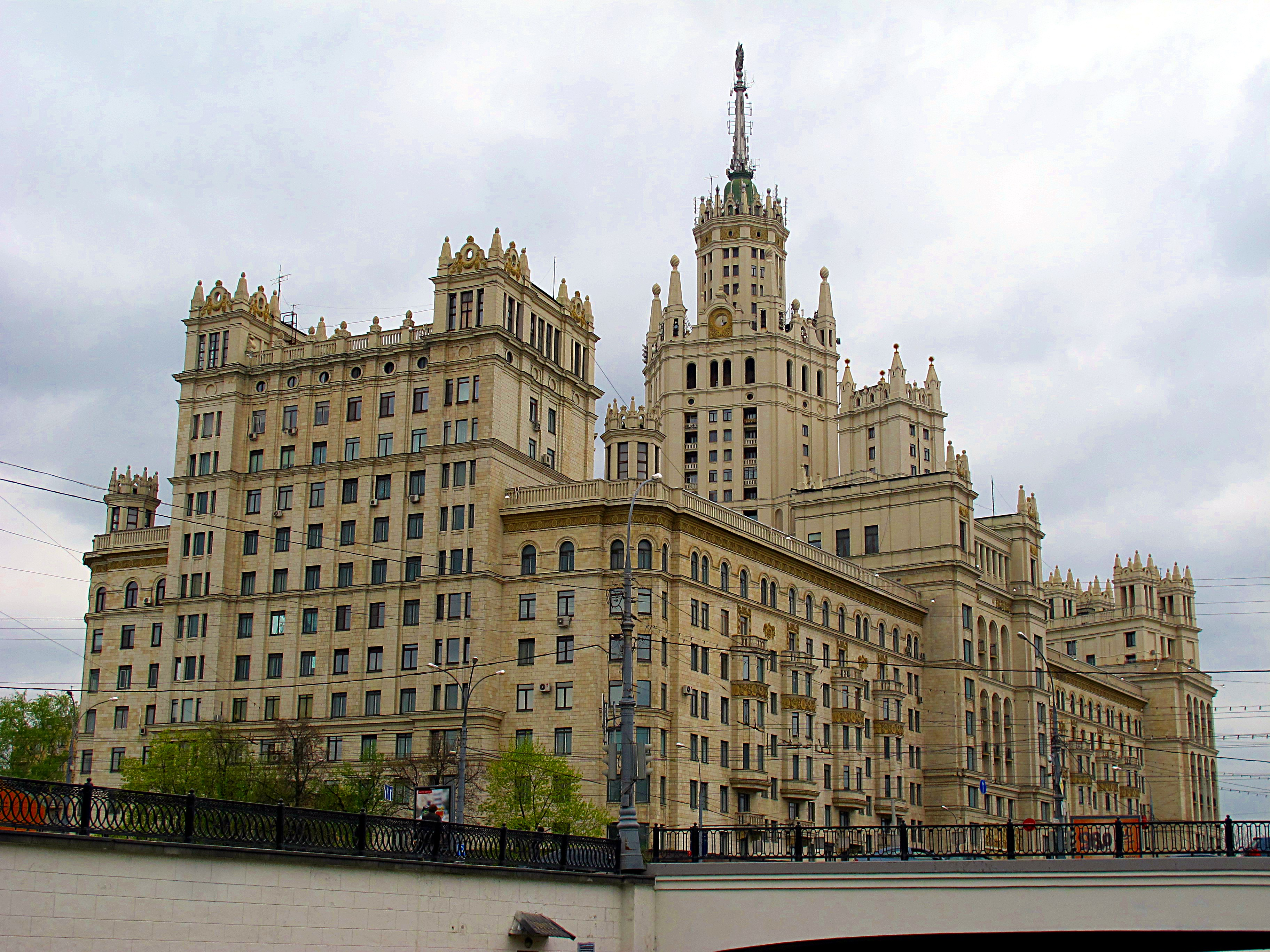 Жилой дом на Котельнической набережной